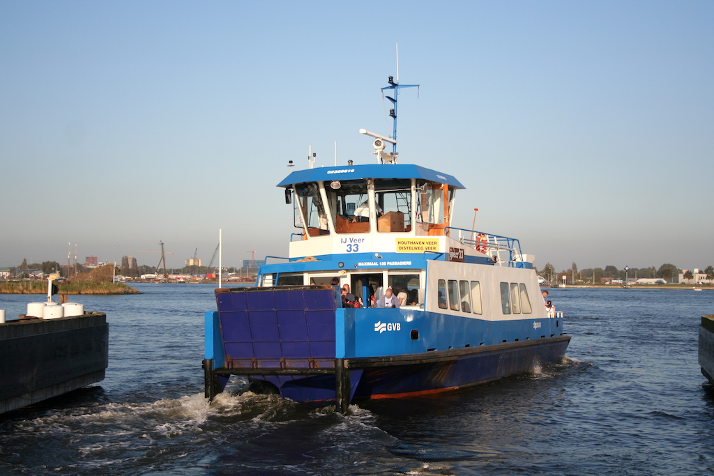 GVB IJveer 33 op het IJ. Foto: Erik Swierstra.